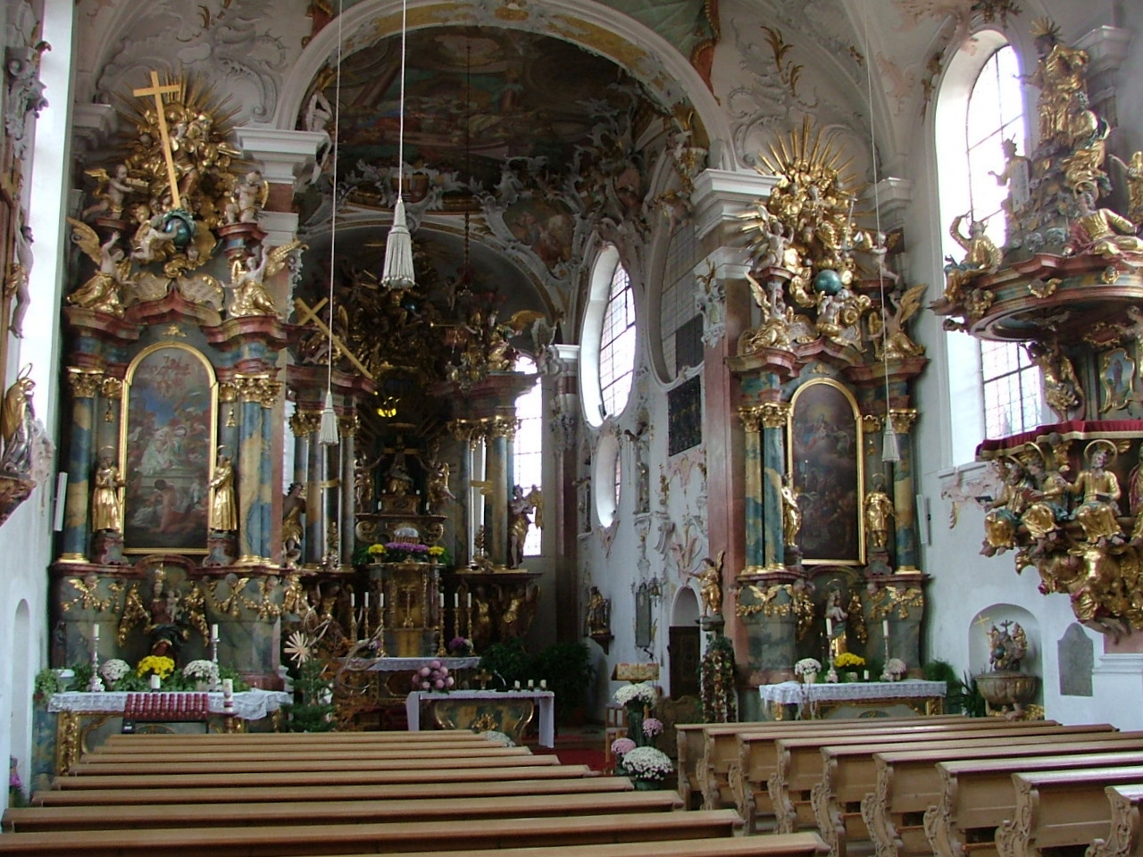 Oberostendorf